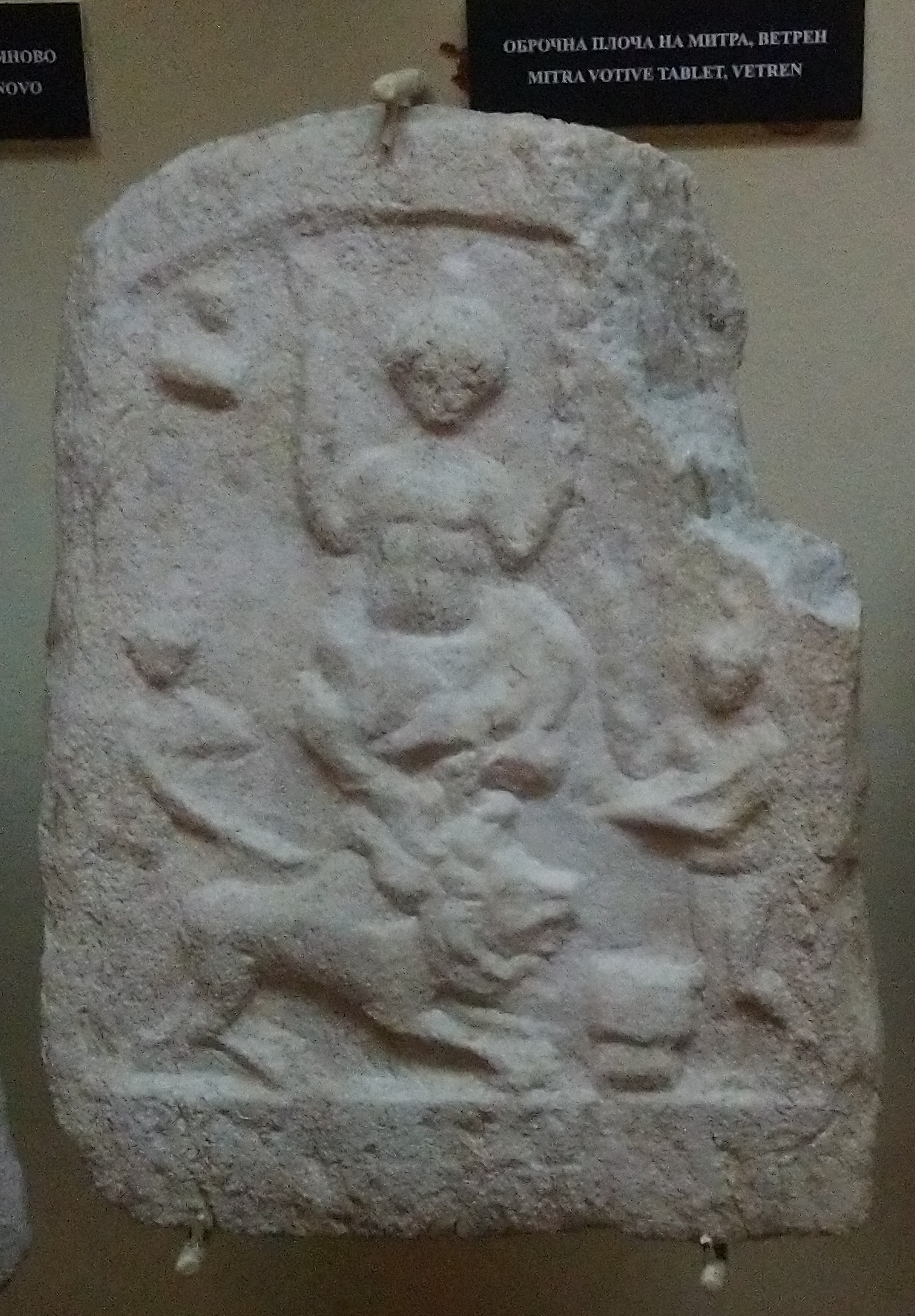 Исторически музей Пазарджик - Оброчна плочка на Митра, Ветрен